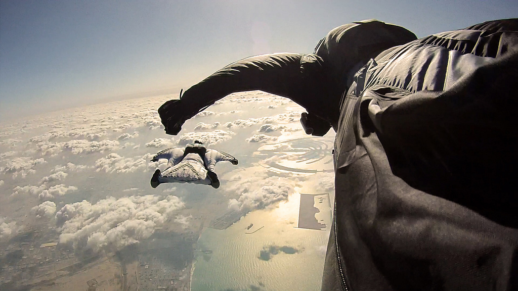 Dubai Wingsuit Flying Trip